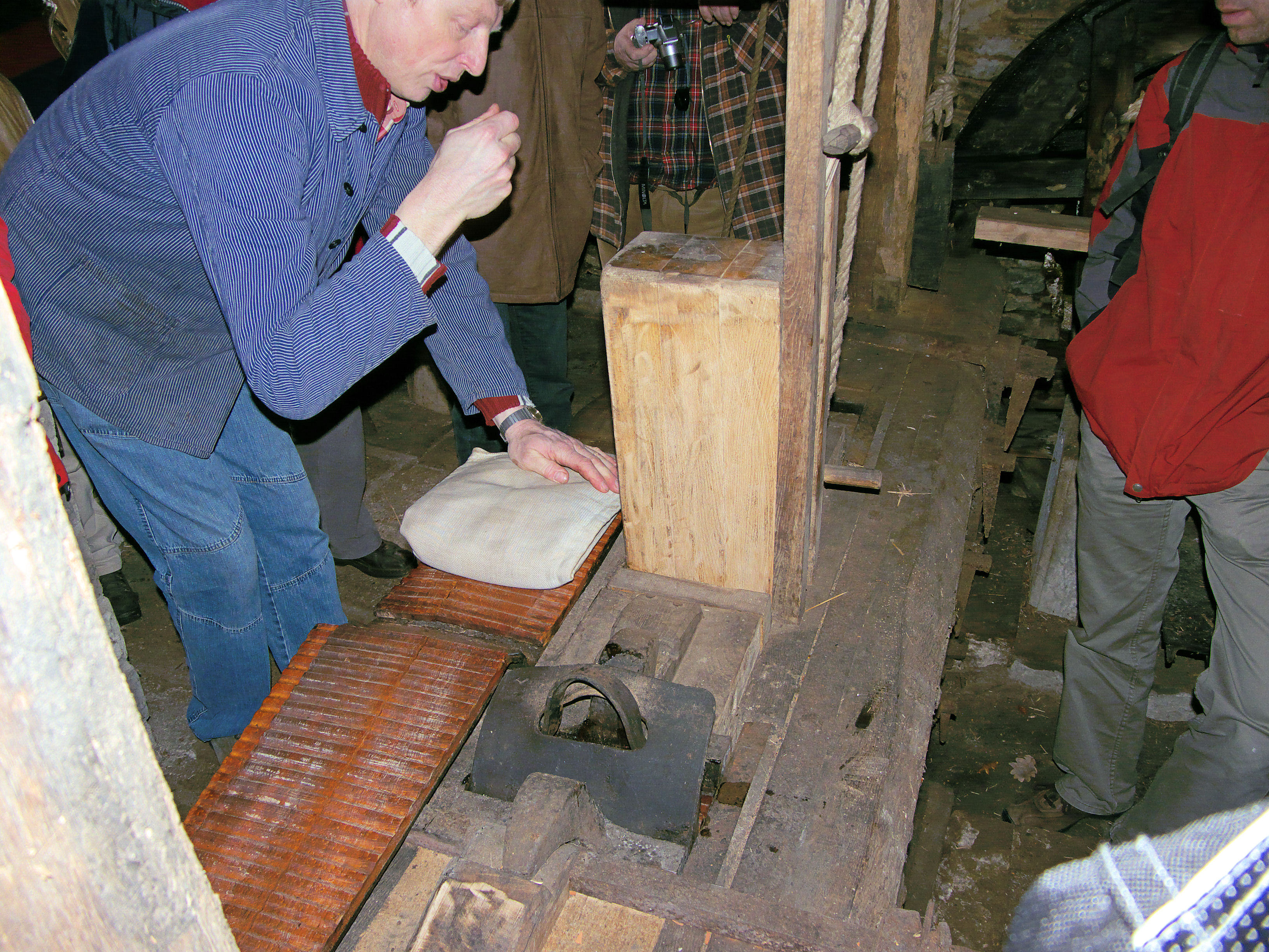 Molen Korn- und Ölmühle Overmeyer haar met buul